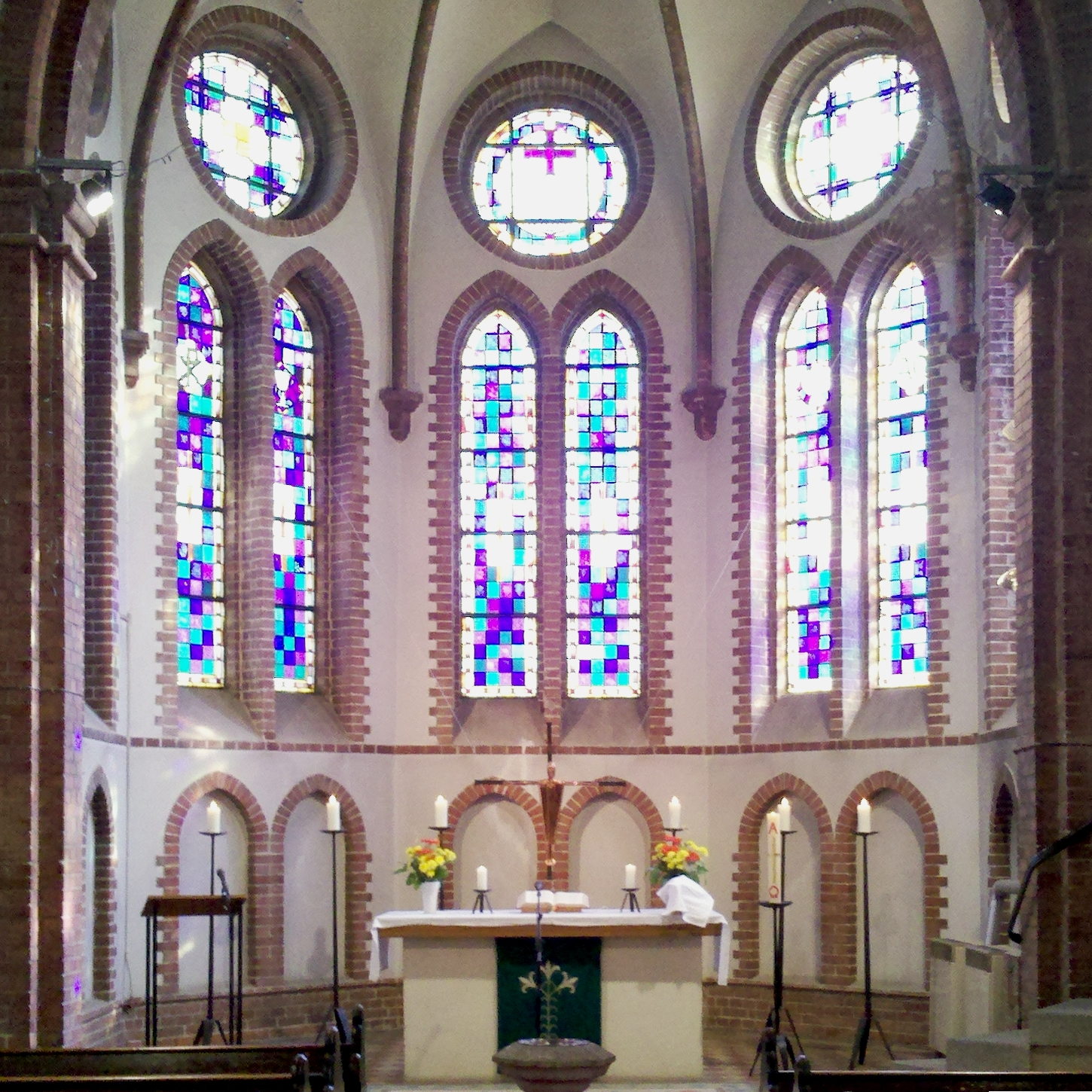 Johanniskirche Eberswalde: Altarraum